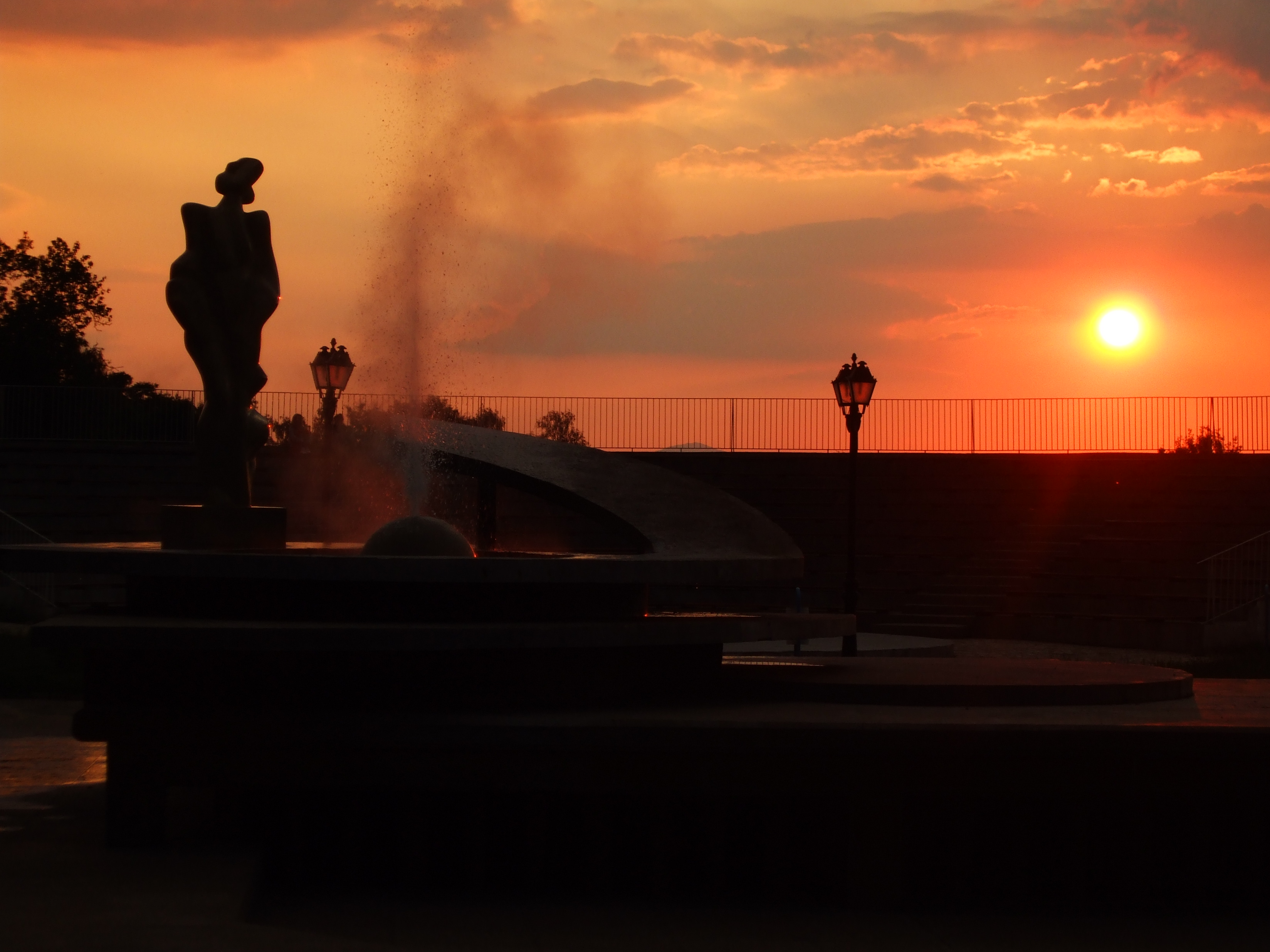 Гейзерът в Сапарева баня